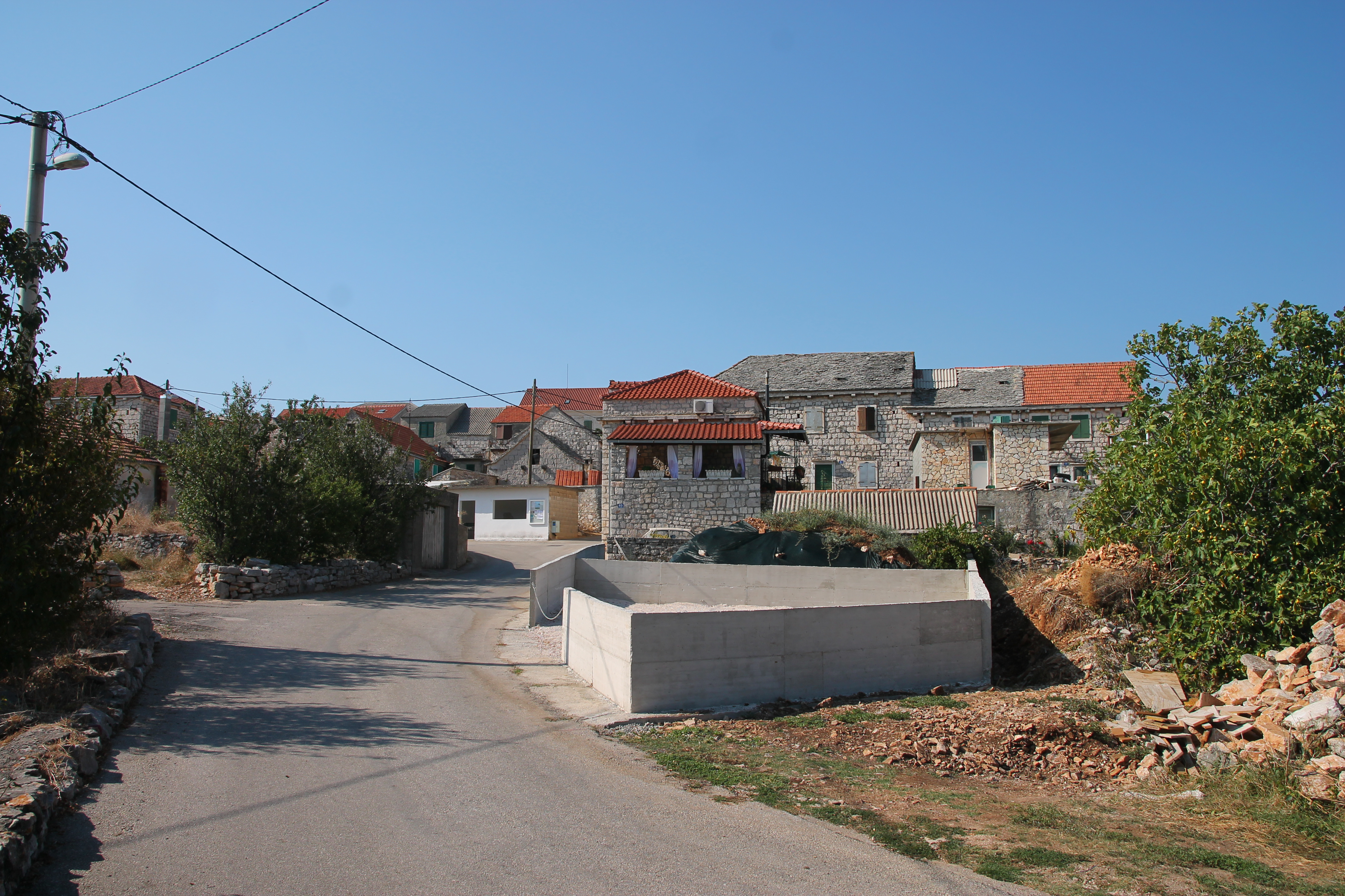 Domy v Dolním Selu